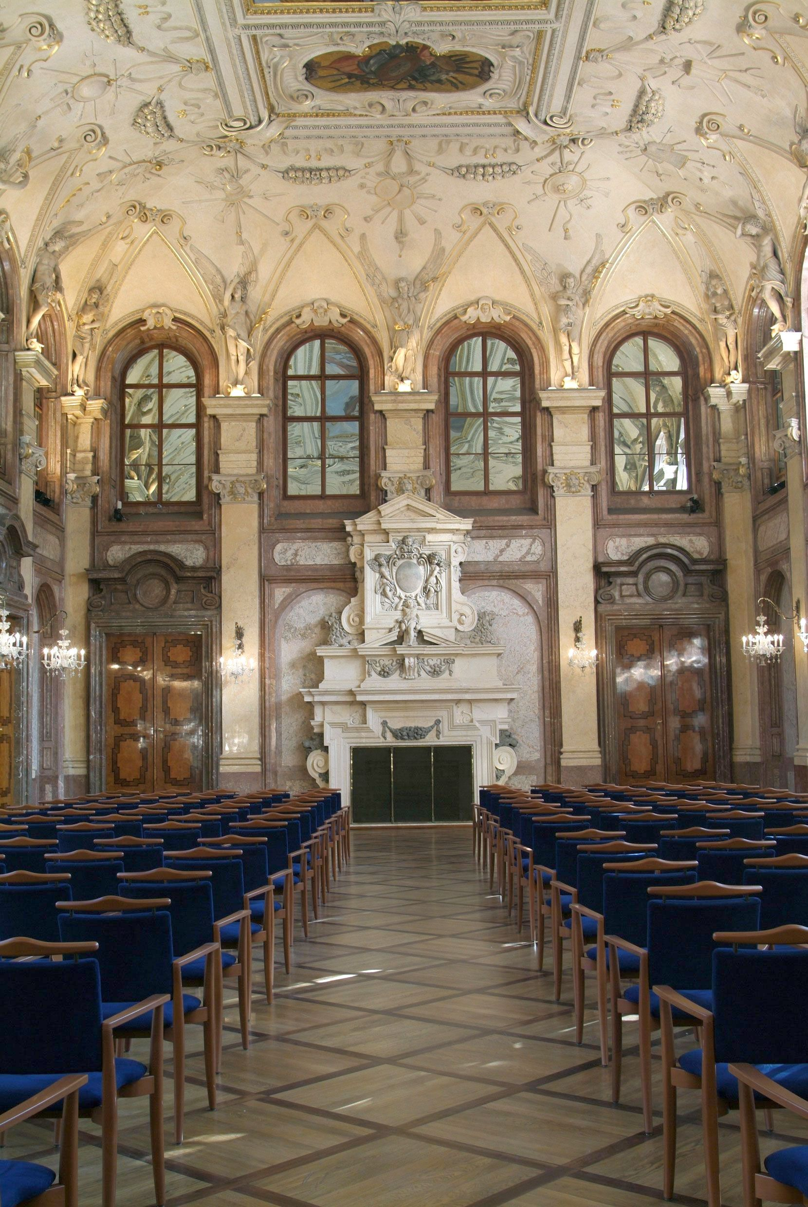 Valdstejnsky palac, Hlavní sál